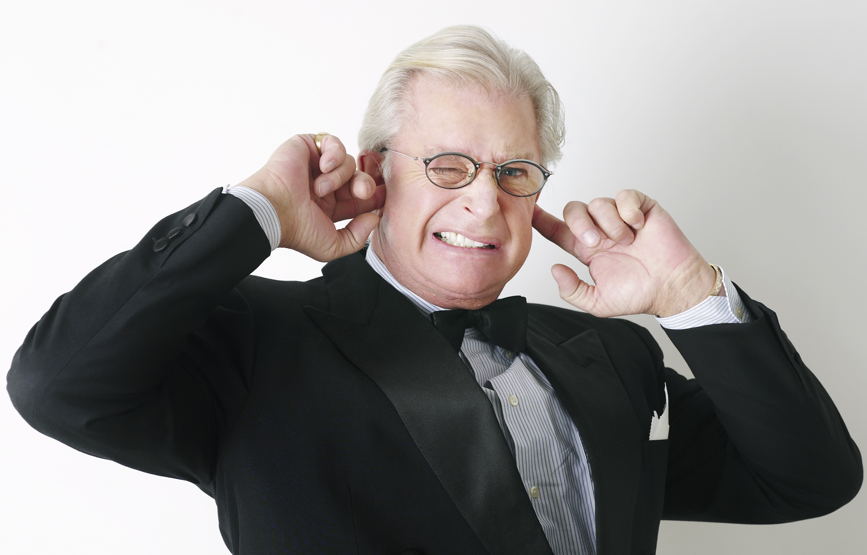 Skådespelaren Ulf Brunnberg.